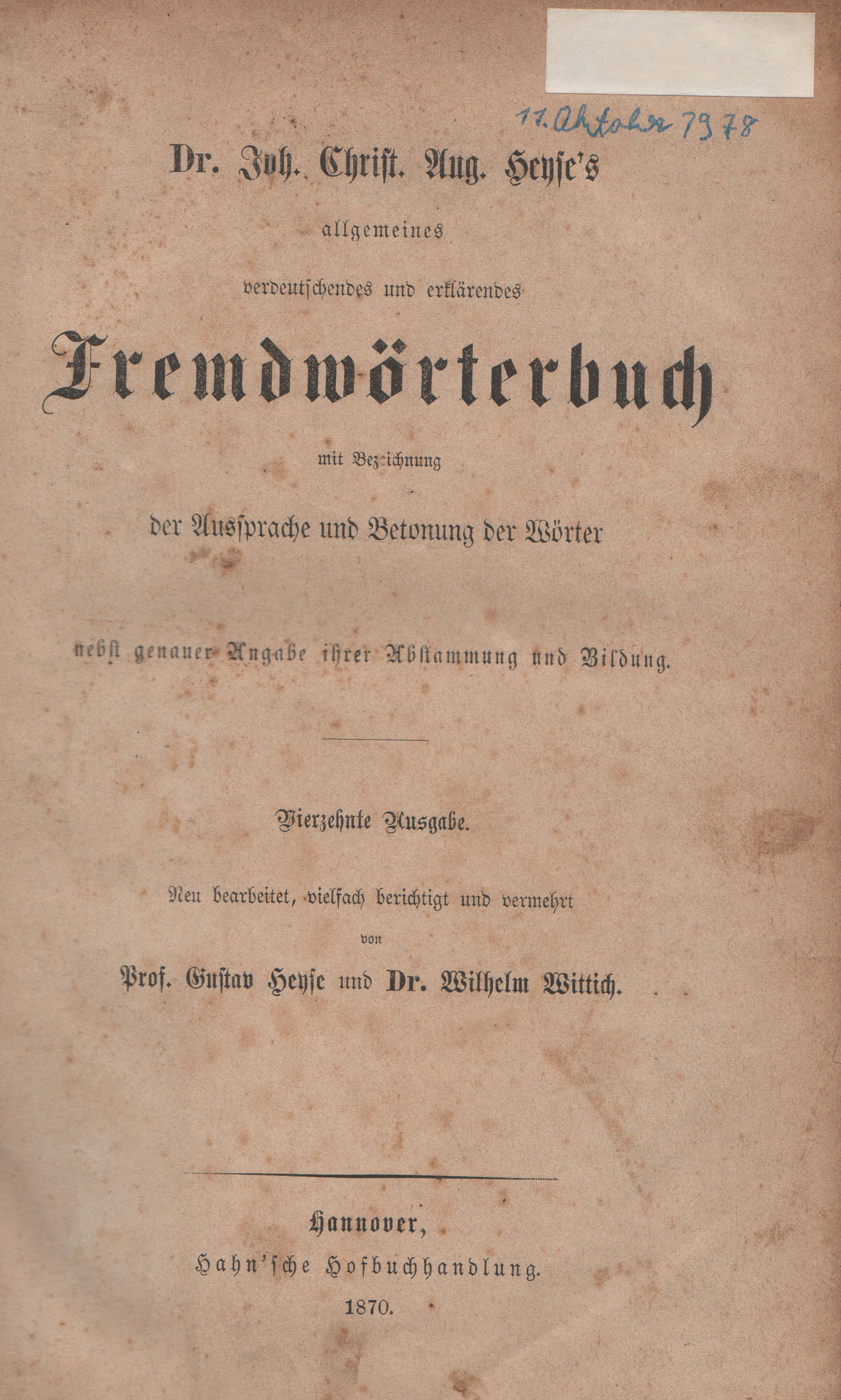 Johann Christian August Heyse: Allgemeines verdeutschendes und erklärendes Fremdwörterbuch mit Bezeichnung der Aussprache und Betonung der Wörter nebst genauer Angabe ihrer Abstammung und Bildung. 14. Auflage von Gustav Heyse und Wilhelm Heinrich von Wittich, Hannover 1870.